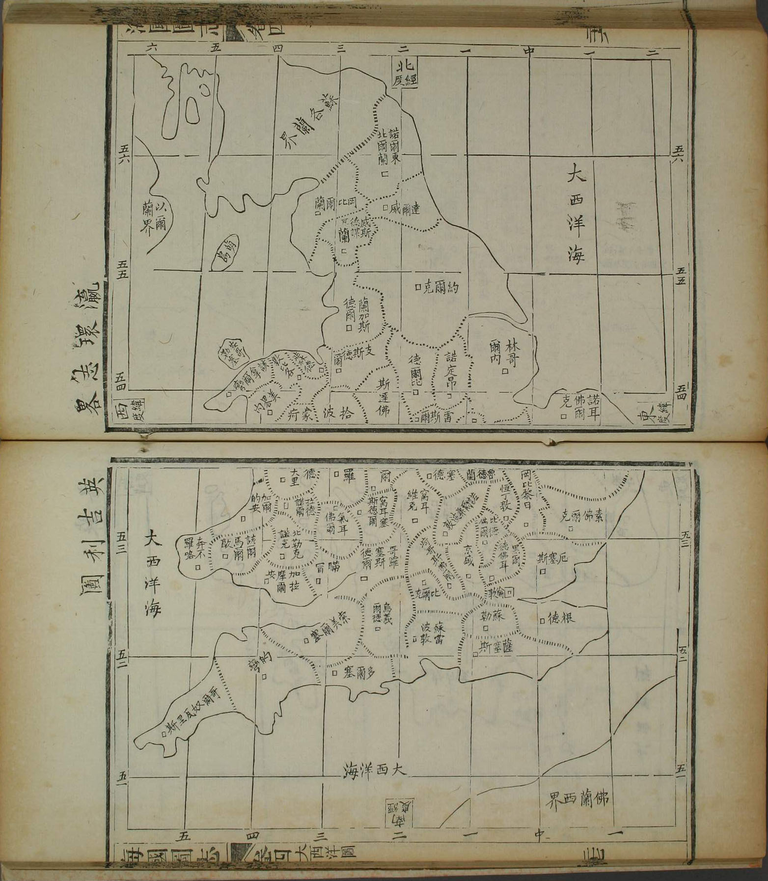 《海國圖志》卷四：英吉利圖